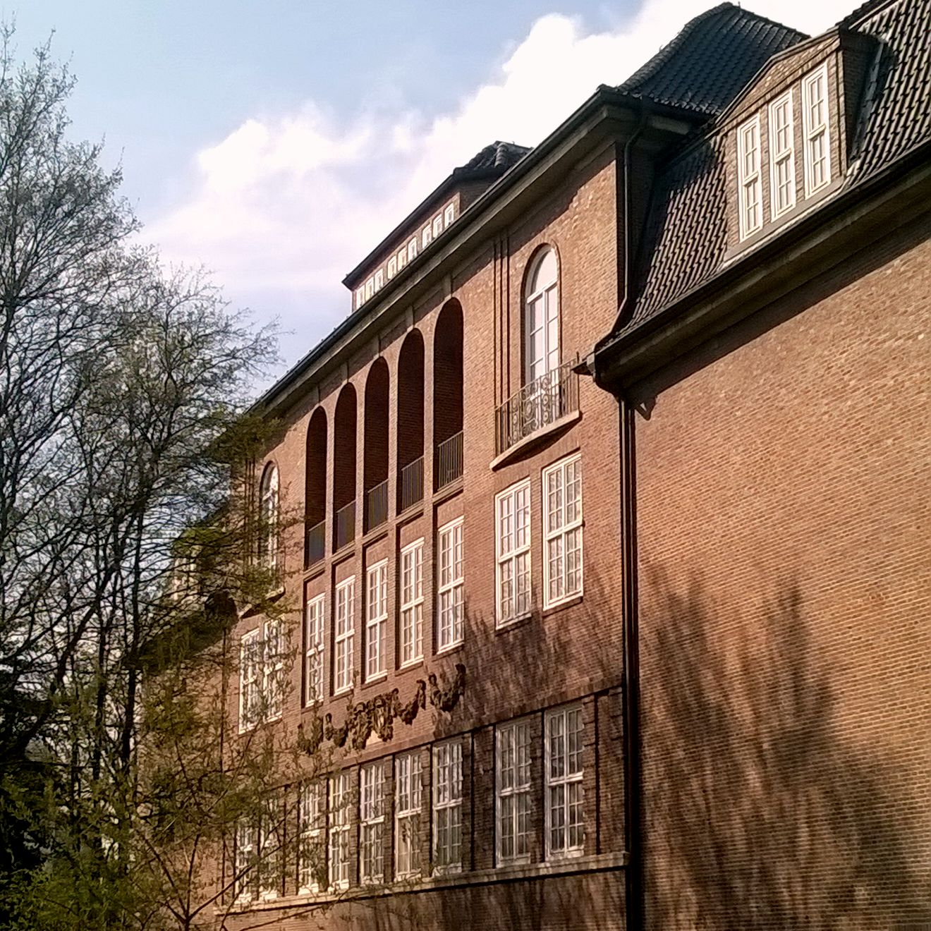 Südfassade des Museum für Hamburgische Geschichte, erbaut von Fritz Schumacher, die Rundbögen im Obergeschoss sind der ehem. Villa Rücker nachempfunden, deren Innenausstattung hinter der Fassade eingebaut werden sollte